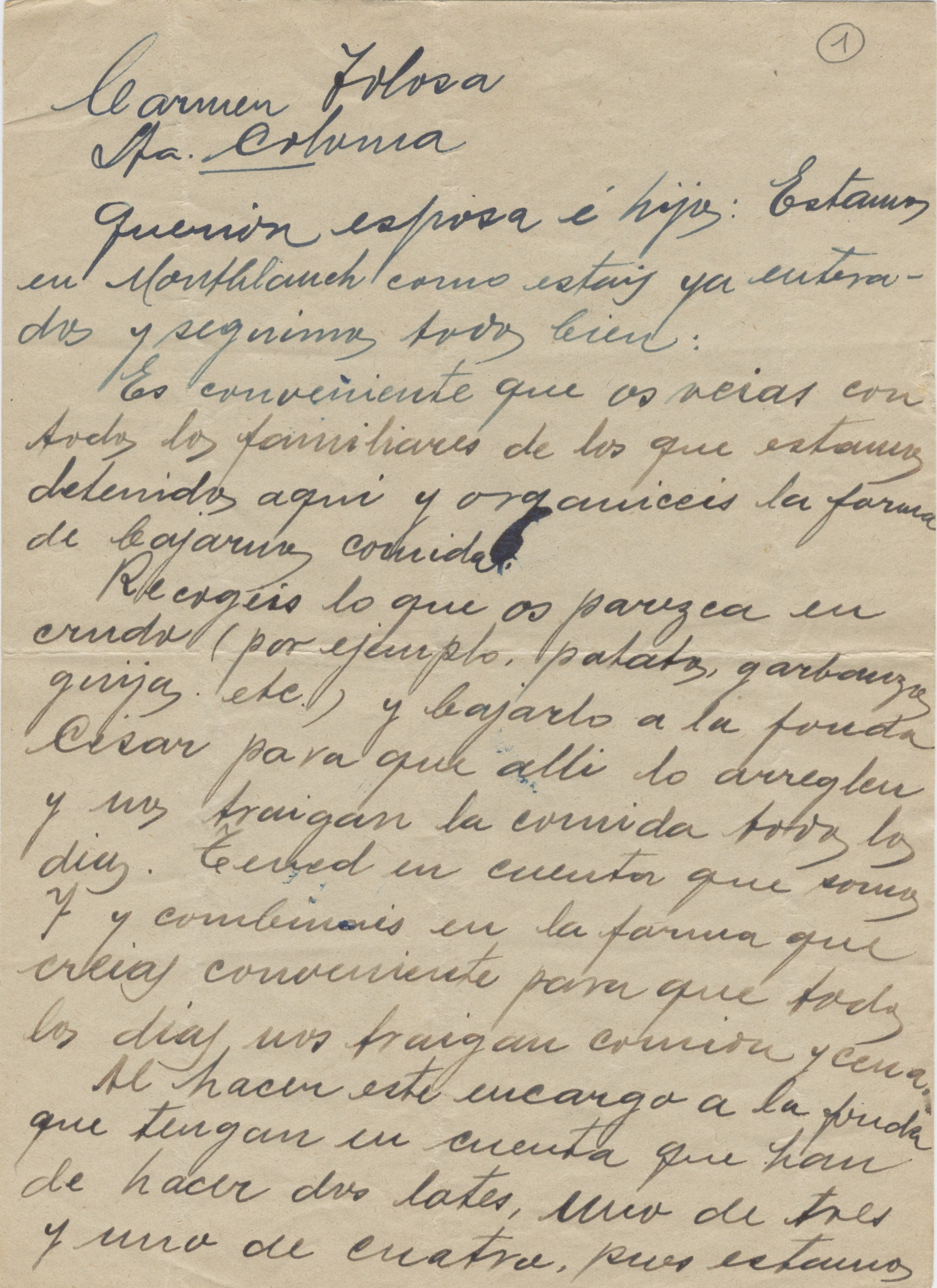 1a carta de la presó escrita per Lluís Solà Padró, des de Montblanc.